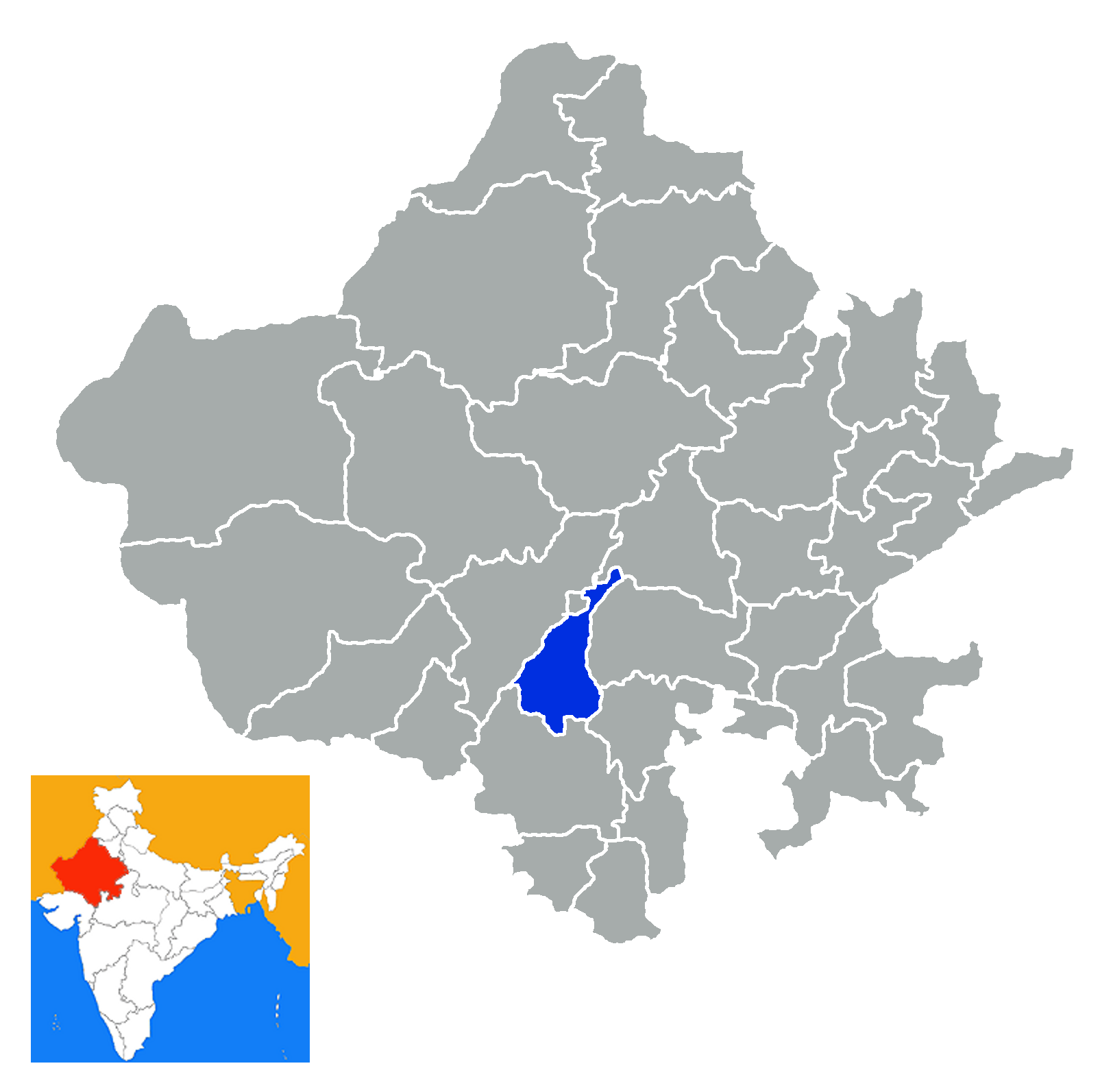 Distrito de Rajsamand Rajastan India